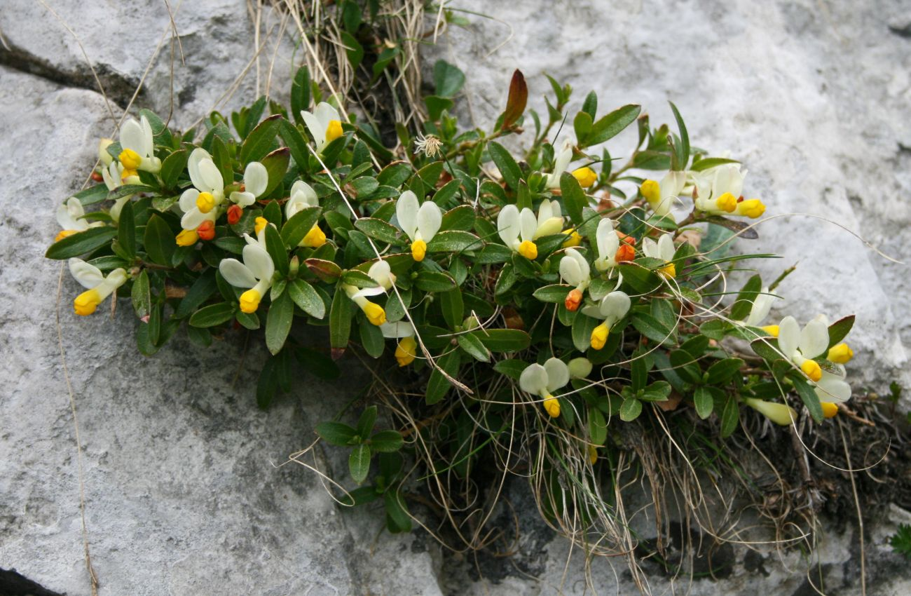 Buchs-Kreuzblume (Polygaloides chamaebuxus, Polygala chamaebuxus), Kreuzblumengewächse (Polygalaceae) - Italien/Italia/Italy: Toscana, Prov. Lucca, Parco Regionale delle Alpi Apuane, N Foce Giovo, gegen Pizzo d'Uccello